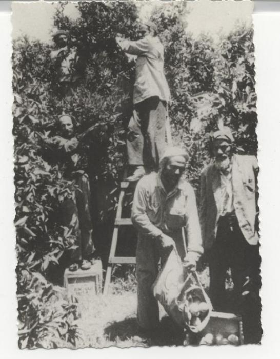 פועלים תימנים בקטיף תפוזים בפרדסי רחובות